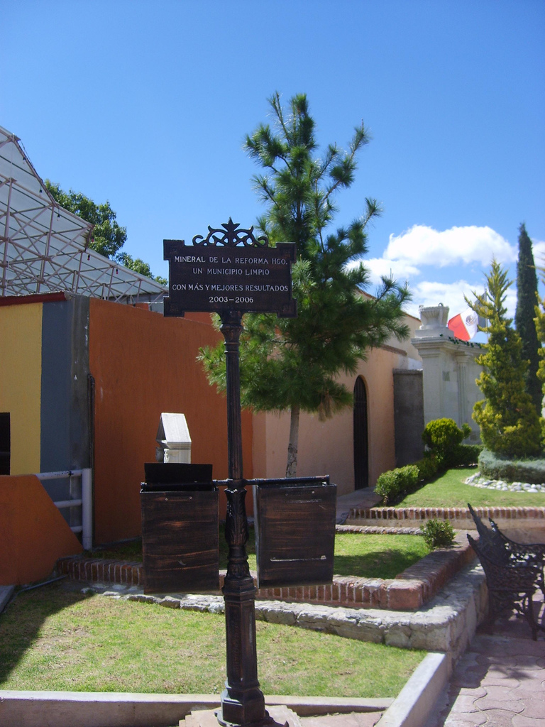 Los botes de basura que "dejan constancia de la limpieza de este municipio"